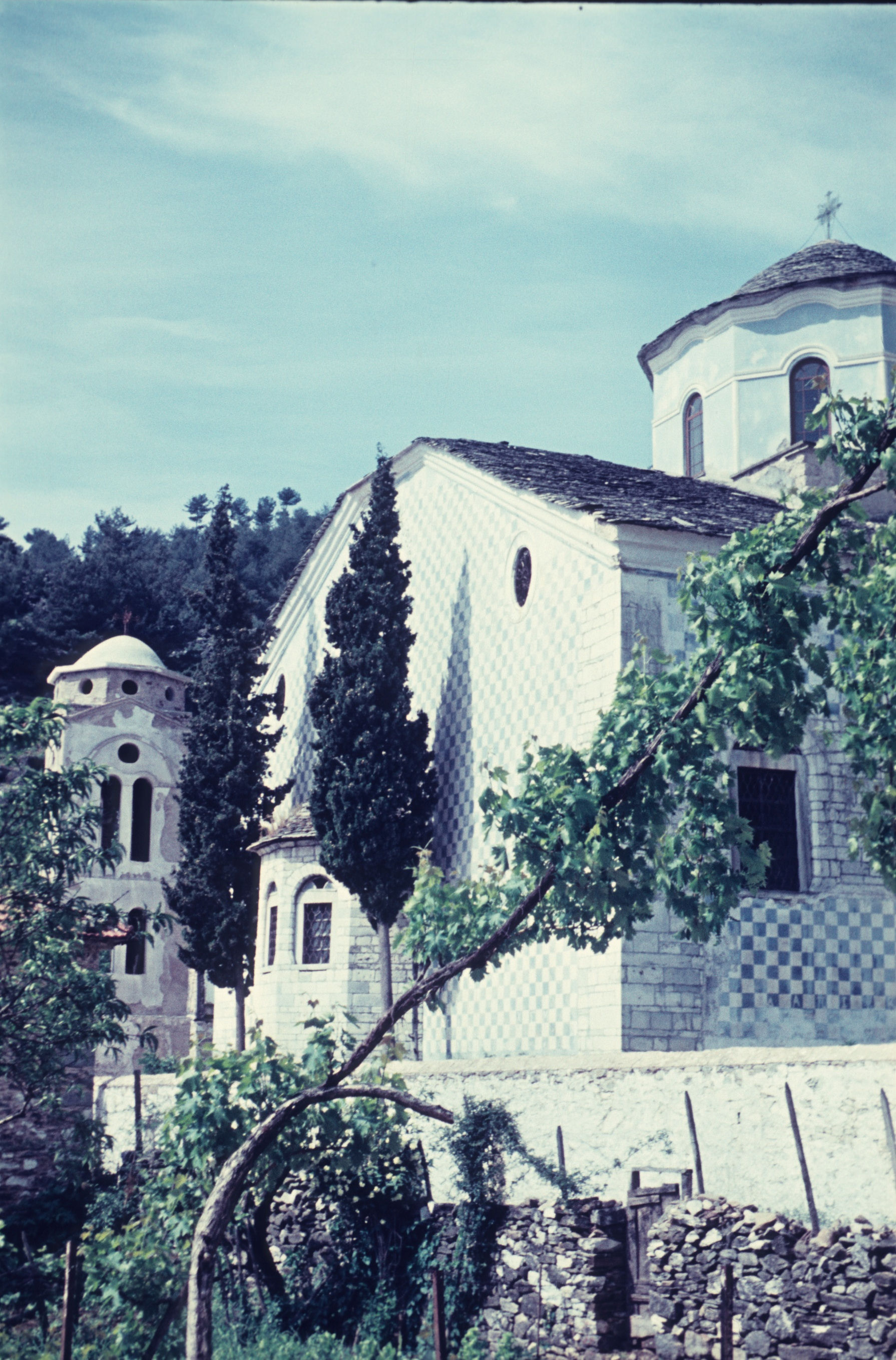 Marienkirche (Κοιμήσις της Παναγίας)(1957)